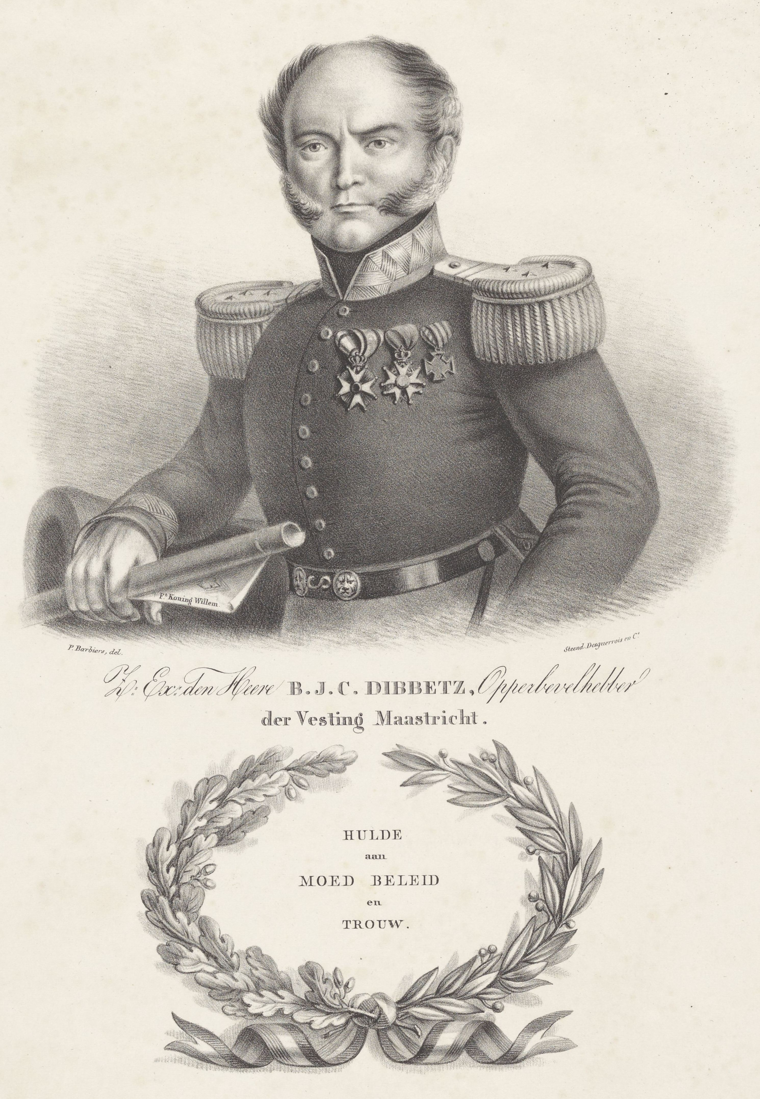 IdentificatieTitel(s): Portret van commandant Bernardus Johannes Cornelis DibbetsObjecttype: prent Objectnummer: RP-P-1899-A-21671Catalogusreferentie: Van Someren 1430Opschriften / Merken: verzamelaarsmerk, verso, gestempeld: Lugt 2228Omschrijving: De geportretteerde heeft in zijn rechterhand een opgerolde plattegrond van (Waar: schijnlijk) Maastricht. Daarop staat: F.t Koning Willem. Op de borst draagt hij drie ridderorden. Onder het portret de naam en functie van de geportretteerde. Daaronder een lauerkrans bestaande uit laurier- en eikenblad met daarin de woorden: hulde aan moed beleid en trouw.VervaardigingVervaardiger: prentmaker: Pieter Barbiers (IV) (vermeld op object)drukker: Desguerrois & Co. (vermeld op object)Plaats vervaardiging: prentmaker: Nederlanddrukker: AmsterdamDatering: 1808 - 1848Fysieke kenmerken: lithografieMateriaal: papier Techniek: lithografie (techniek)Afmetingen: blad: h 460 mm × b 317 mmOnderwerpWat: historical personsgarland, wreathmaps of citiesWaarMaastrichtWie: Bernardus Johannes Cornelis baron DibbetsVerwerving en rechtenVerwerving: aankoop mei-1899Copyright: Publiek domein